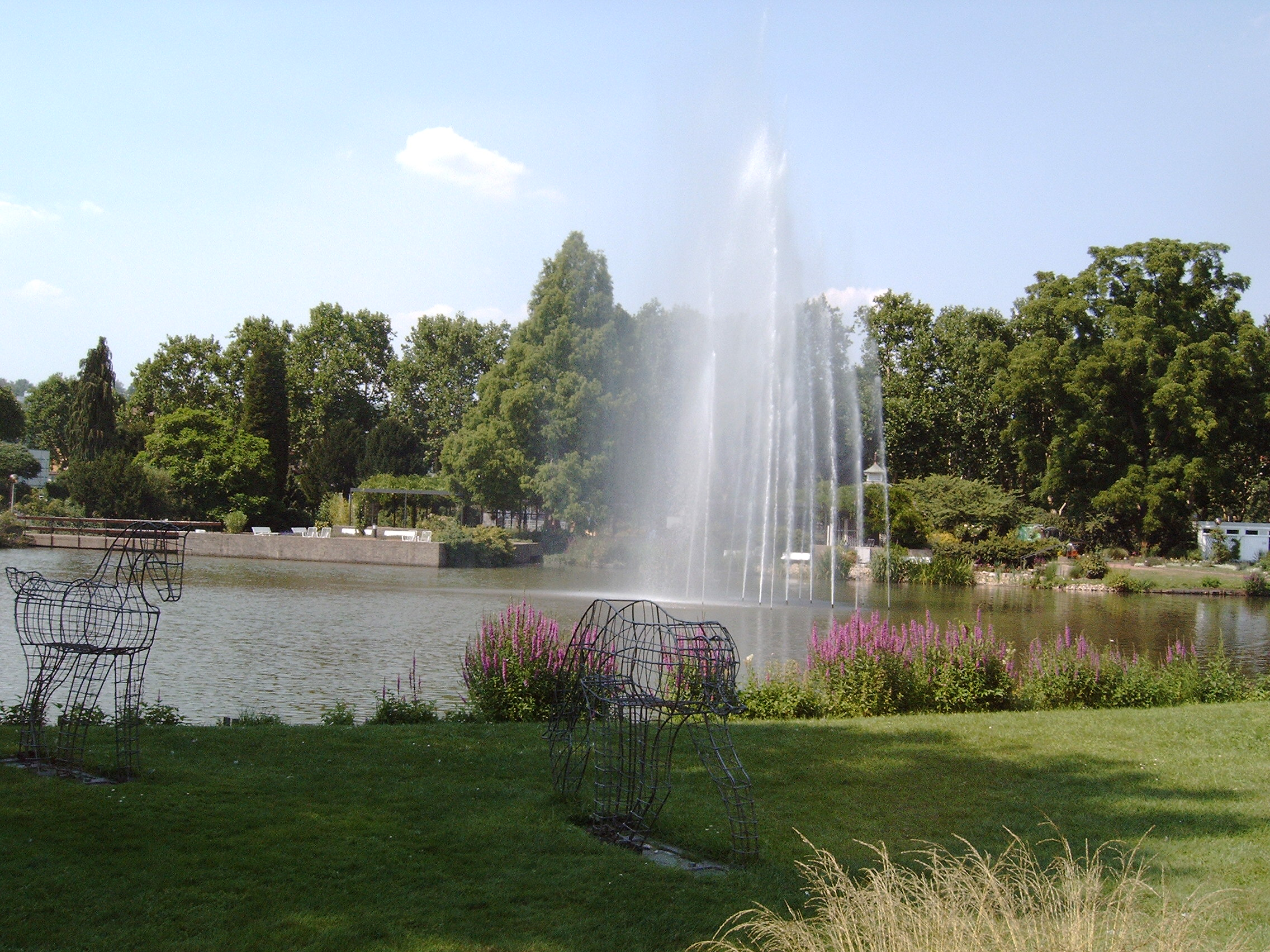 Blick auf Teich mitten in Europas Rosengarten, Zweibrücken.